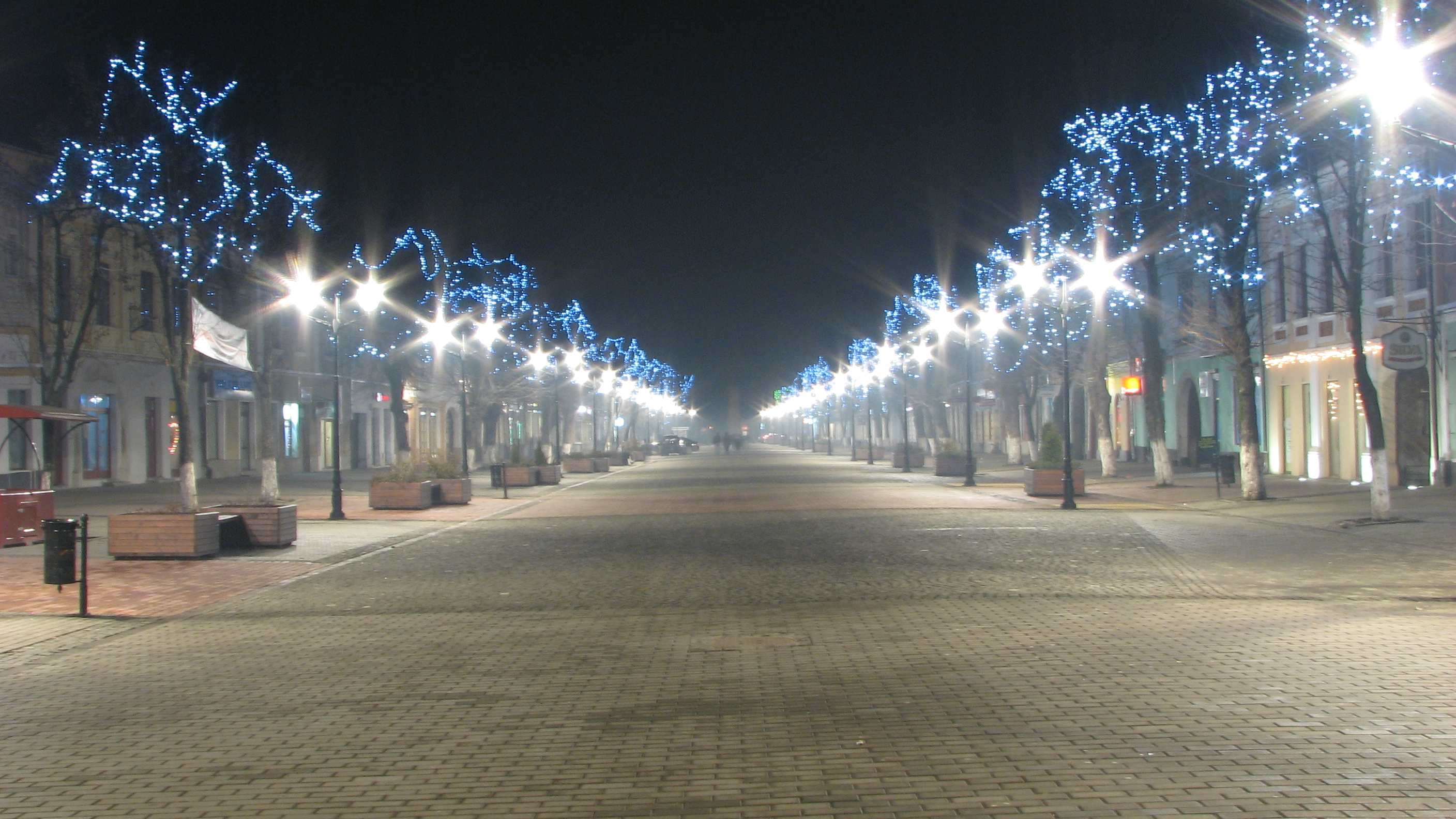 Winter 2007